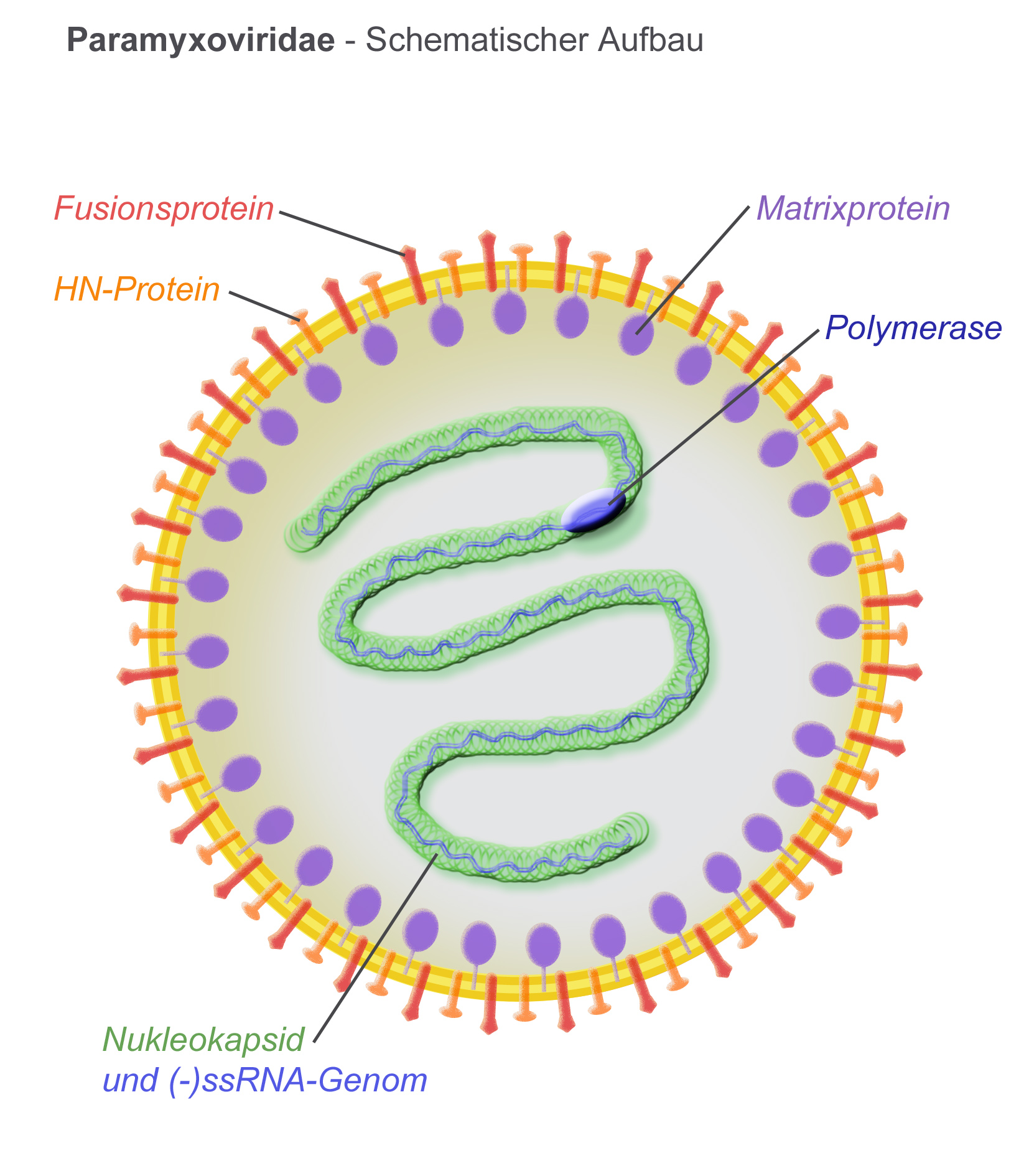 Schematischer Aufbau eines Virions der Virusfamilie Paramyxoviridae